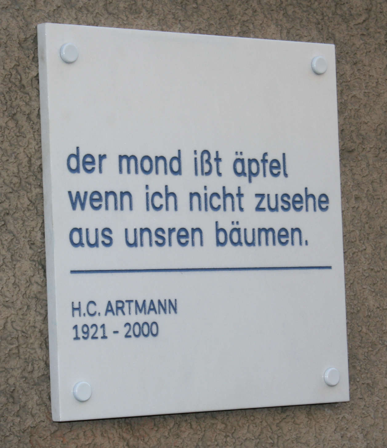 Gedenktafel zu Ehren von H. C. Artmann, am Haus in dem er aufgewachsen ist, in der Kienmayergasse 43 in 1140 Wien